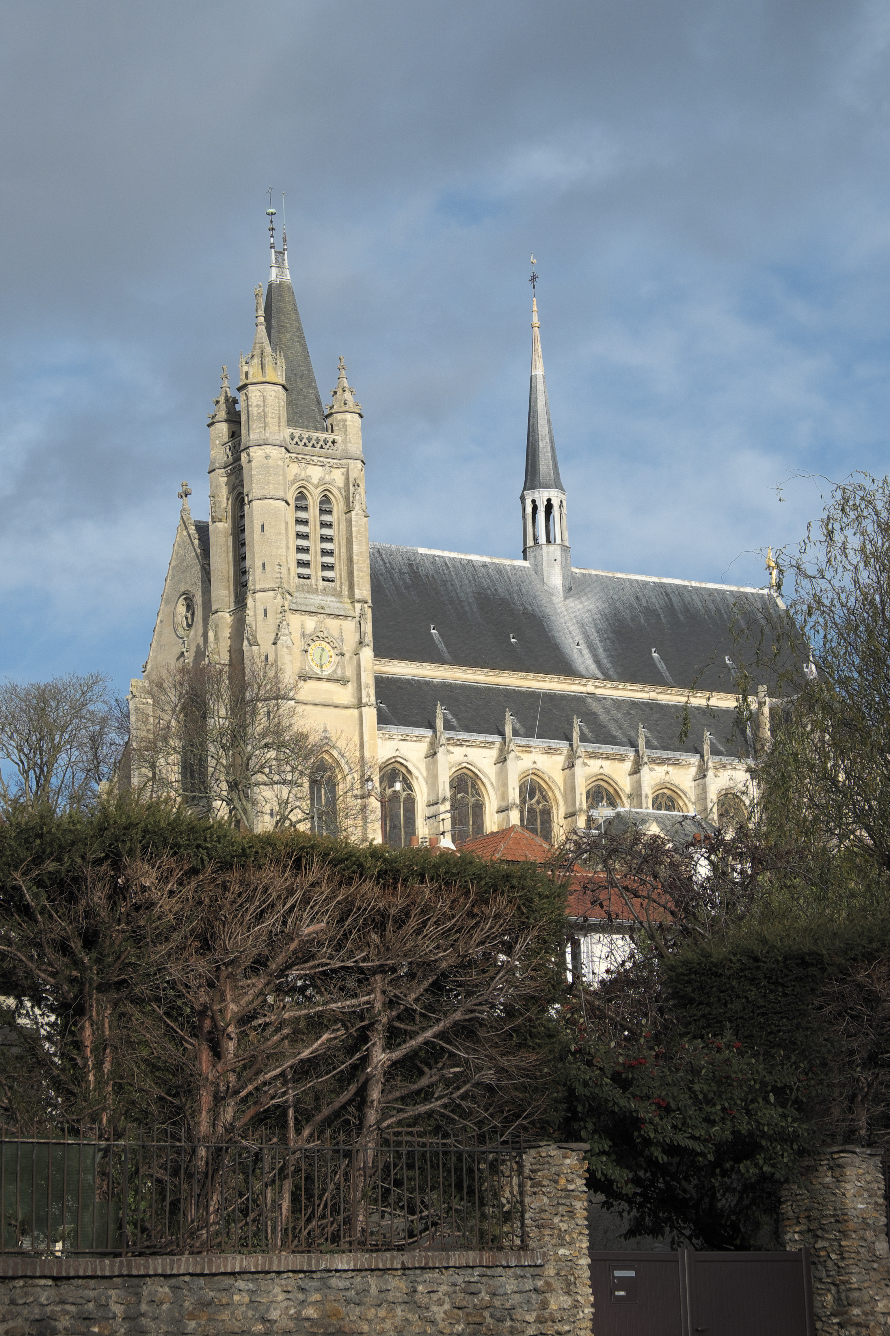 Katholische Pfarrkirche Saint-Martin (Collégiale Saint-Martin) in Montmorency im Département Val d'Oise (Île-de-France/Frankreich), Ansicht von Süden